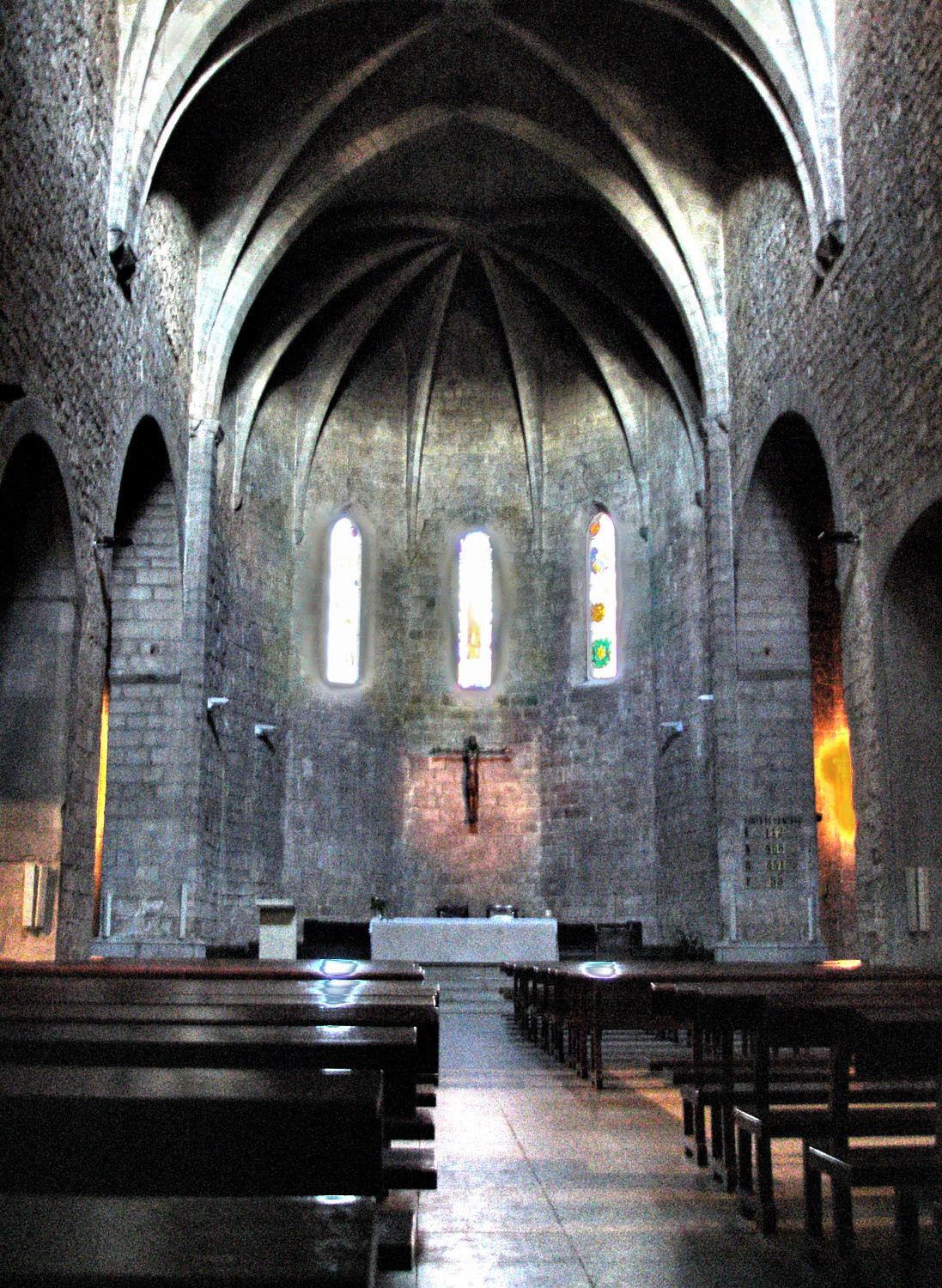 Monestir de Sant Feliu de Guíxols (Girona, Catalunya, Espanya) - Volta gòtica y absis central